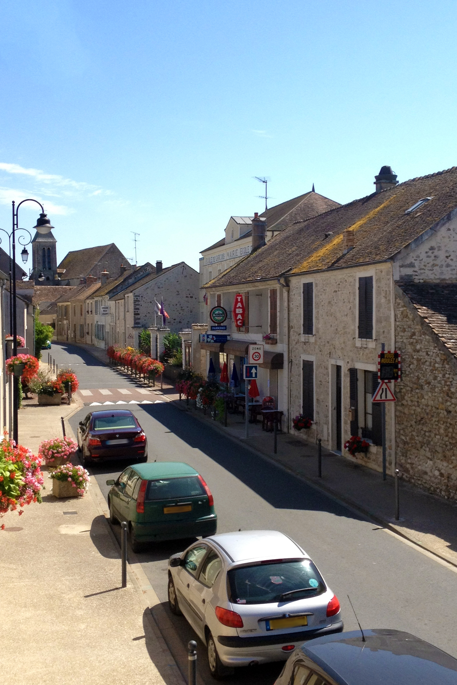 Vue de la Rue Principale de Machault (Seine-et-Marne, France).